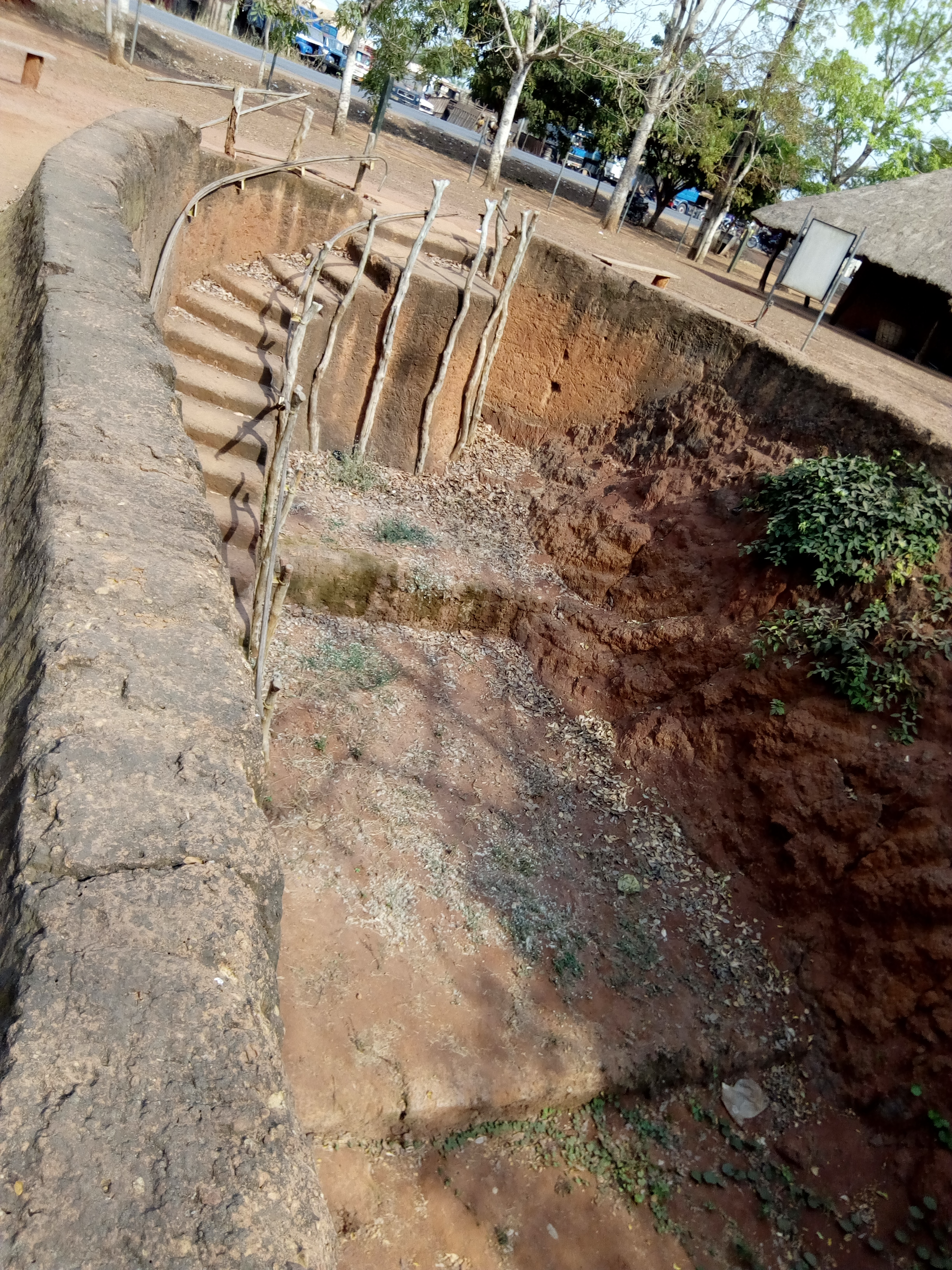 village souterrain d'Agongointo